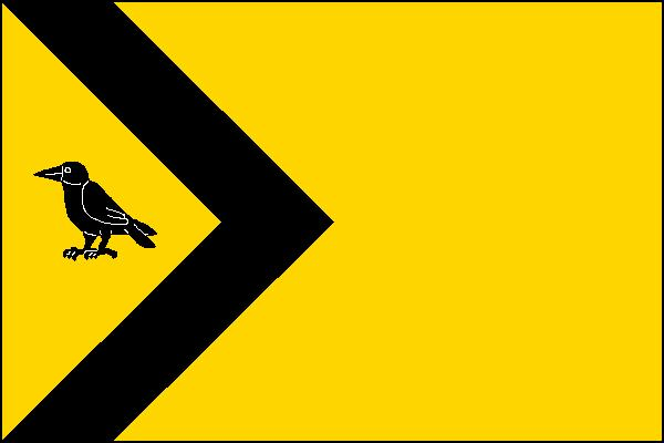 Vlajka obce Kryry